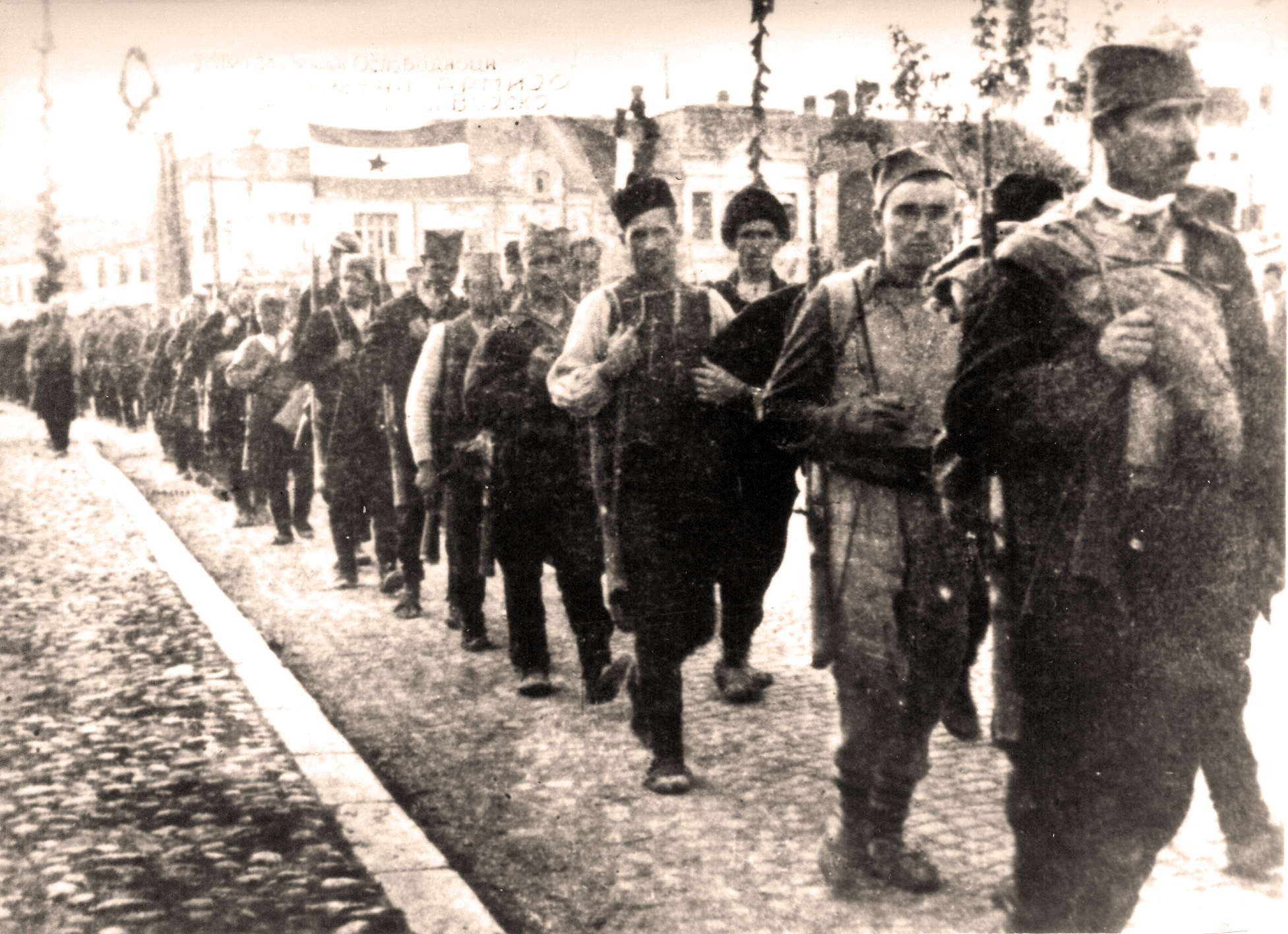 Srpskohrvatski / српскохрватски: Jedinice XIII korpusa NOVJ ulaze u Niš, 14.X.1944.